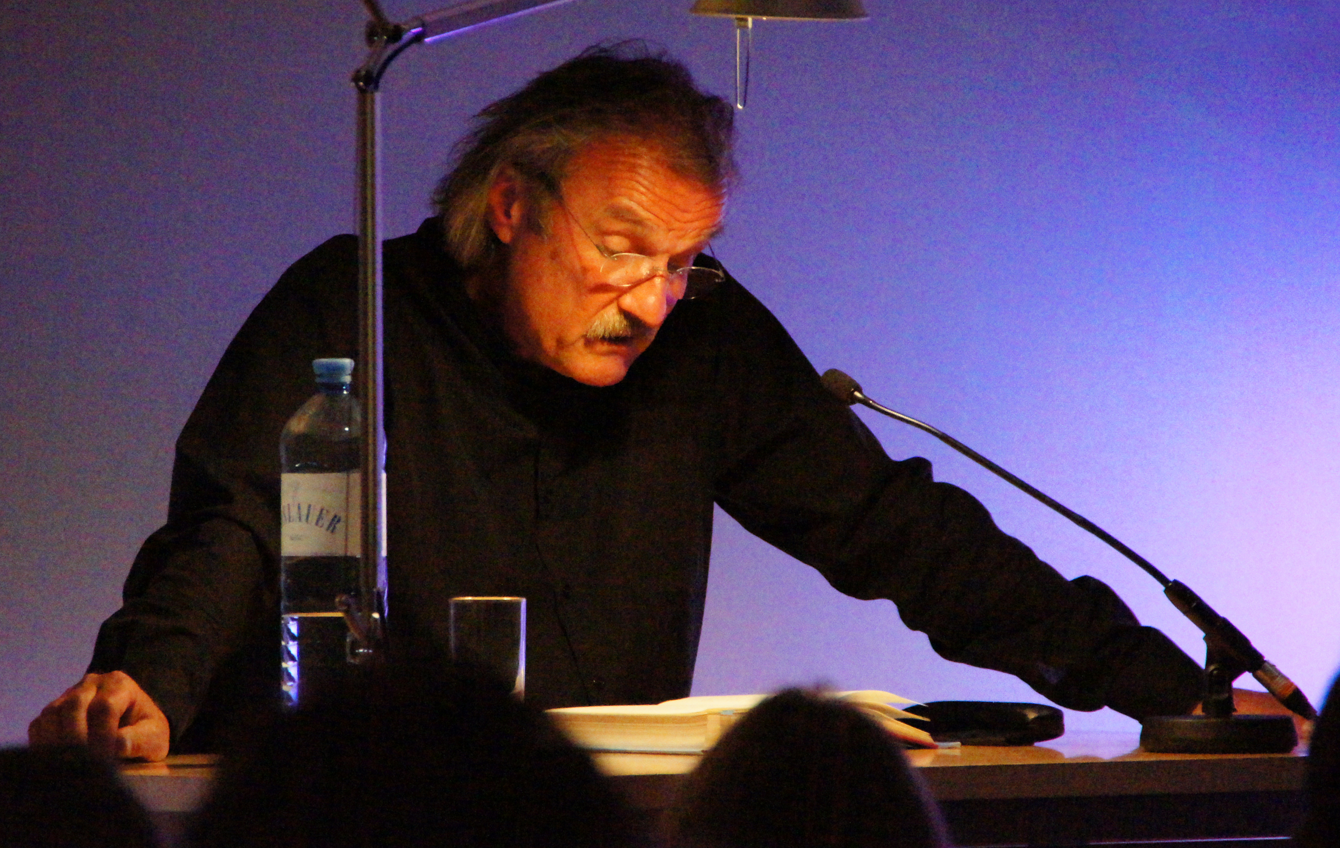 Vienna 2013-04-12 'Hauptbücherei' - Christoph Ransmayr reading 048